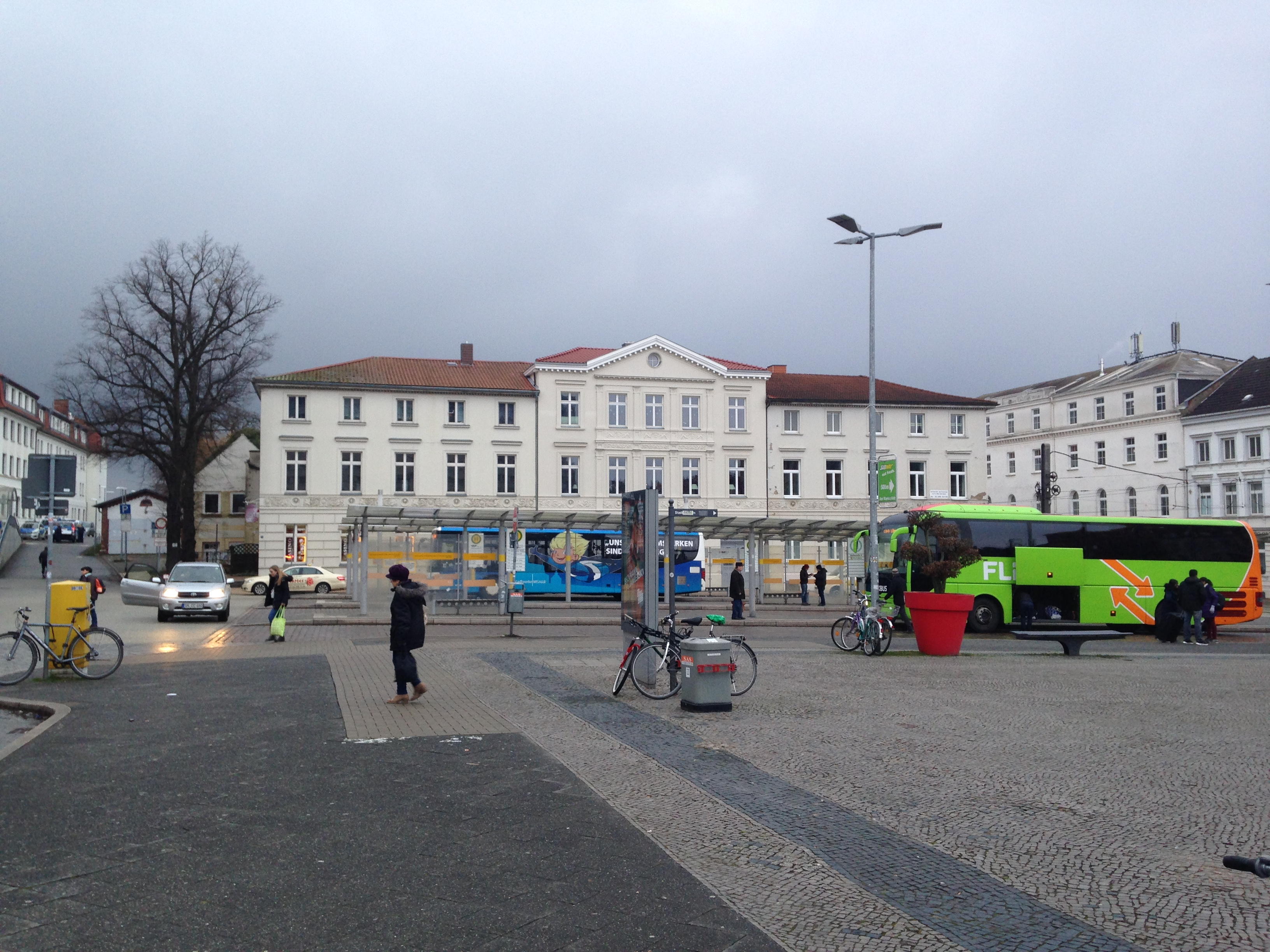 Der Grunthalplatz mit dem Busbahnhof und das denkmalgeschützte Wohn- und Geschäftsgebäude Grunthalplatz 1 / Grunthalplatz 2. Das Haus Nummer 2 (linkes Eckhaus) war das Geburtshaus von Karl-Heinz Förster.